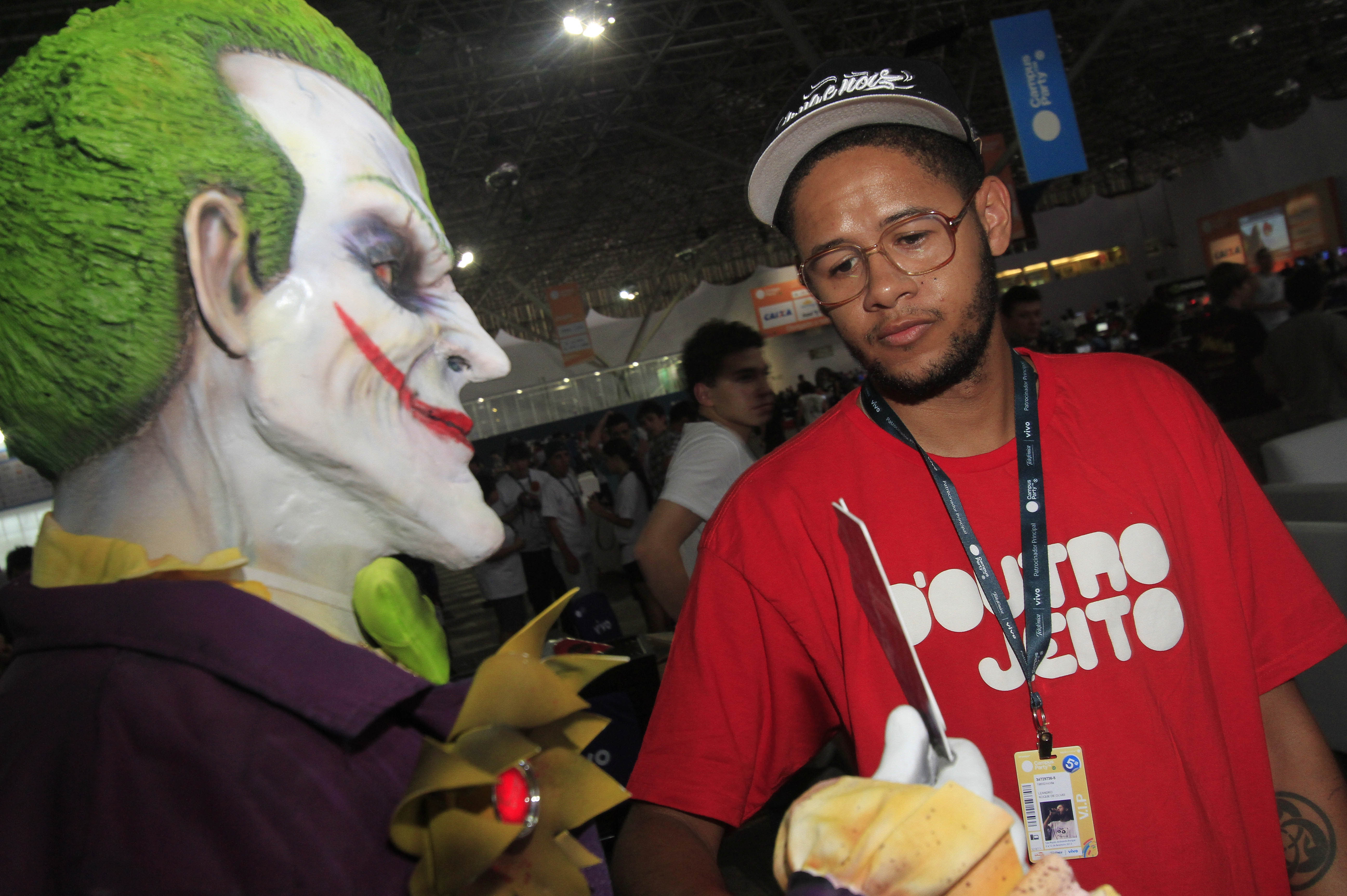 Emicida no Campus Party Brasil 2012. Foto: Cristiano Sant´Anna.